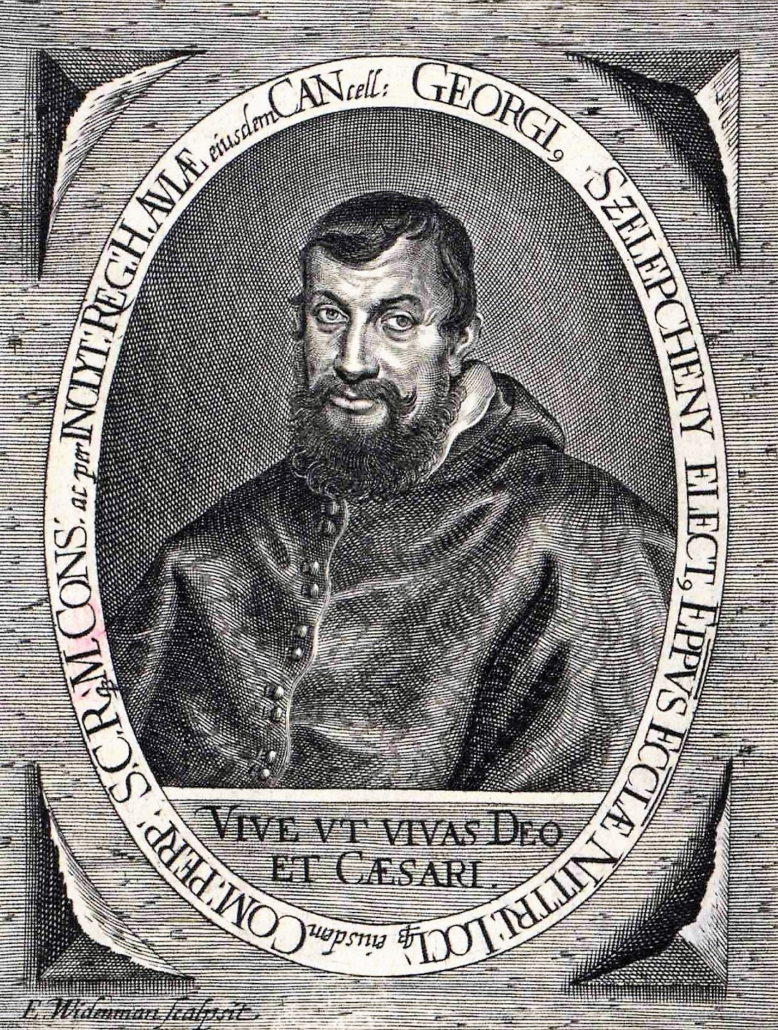 Szelepcsényi György (1595–1685) kalocsai, majd esztergomi érsek portréja. Elias Widemann rézmetszete (1652)